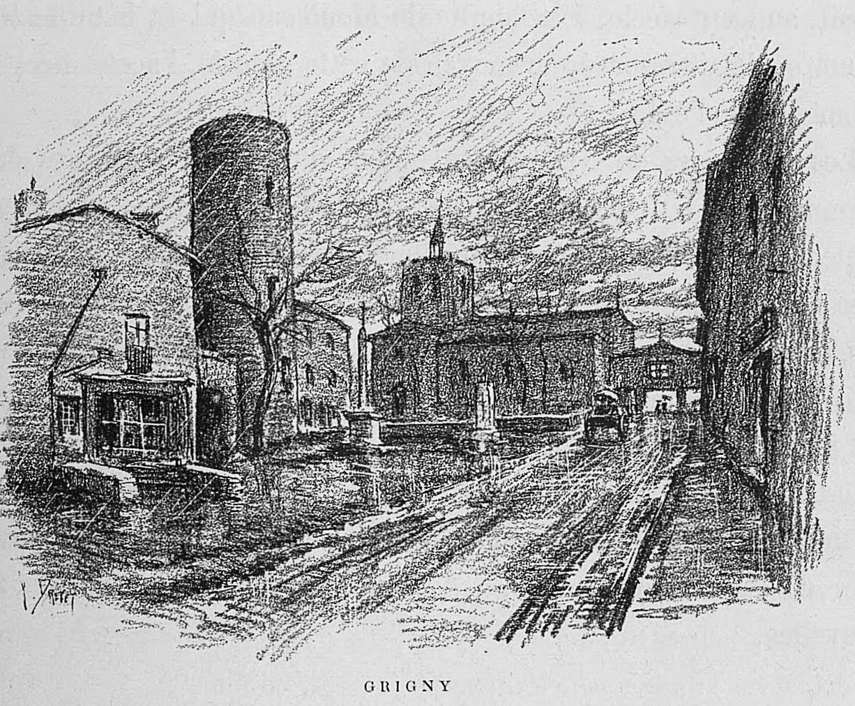 Aux environs de Lyon / Monsieur Josse ; préface de M. Coste-Labaume ; édition illustrée de 250 dessins de J. Drevet.